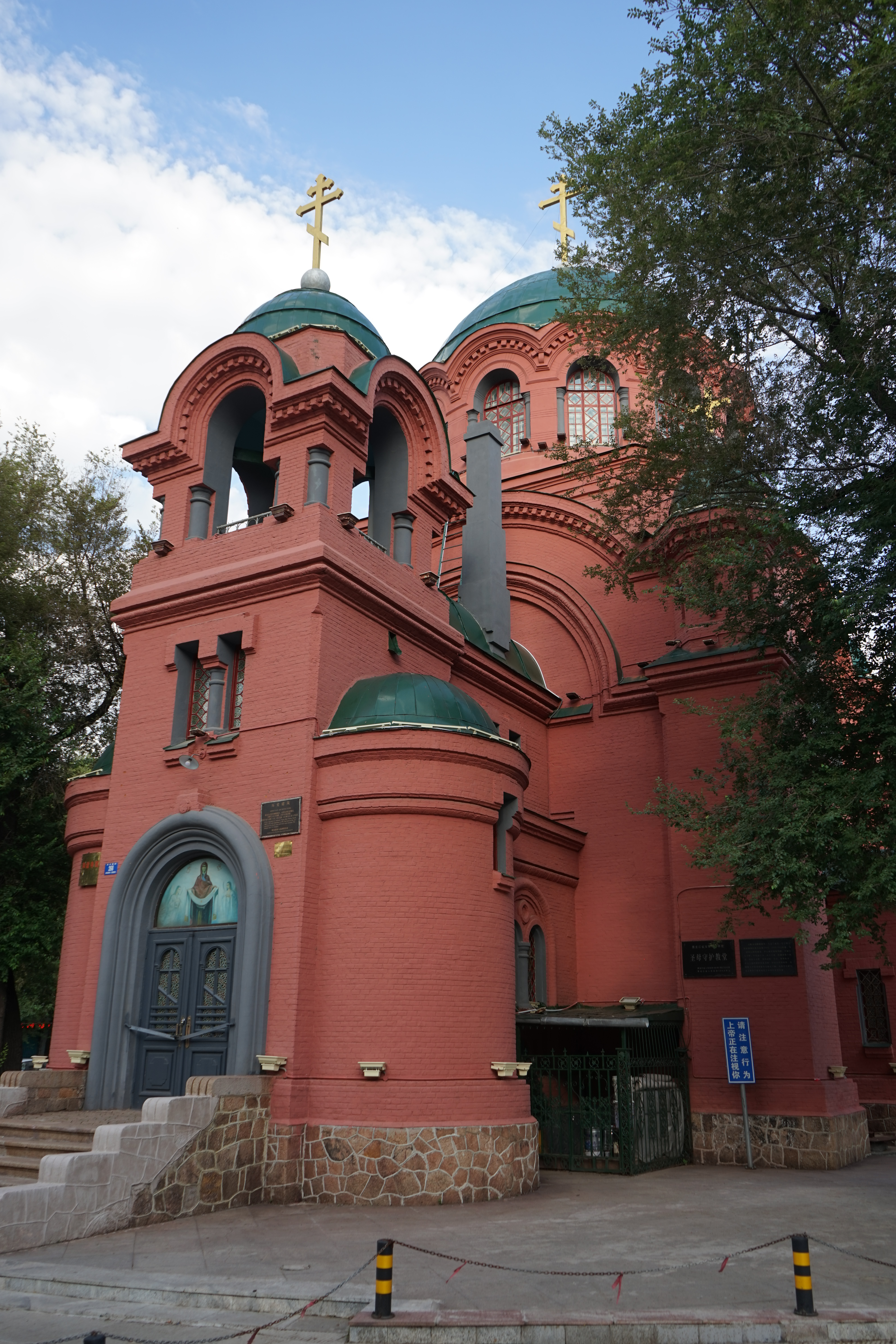 中文（中国大陆）: 哈尔滨圣母守护教堂